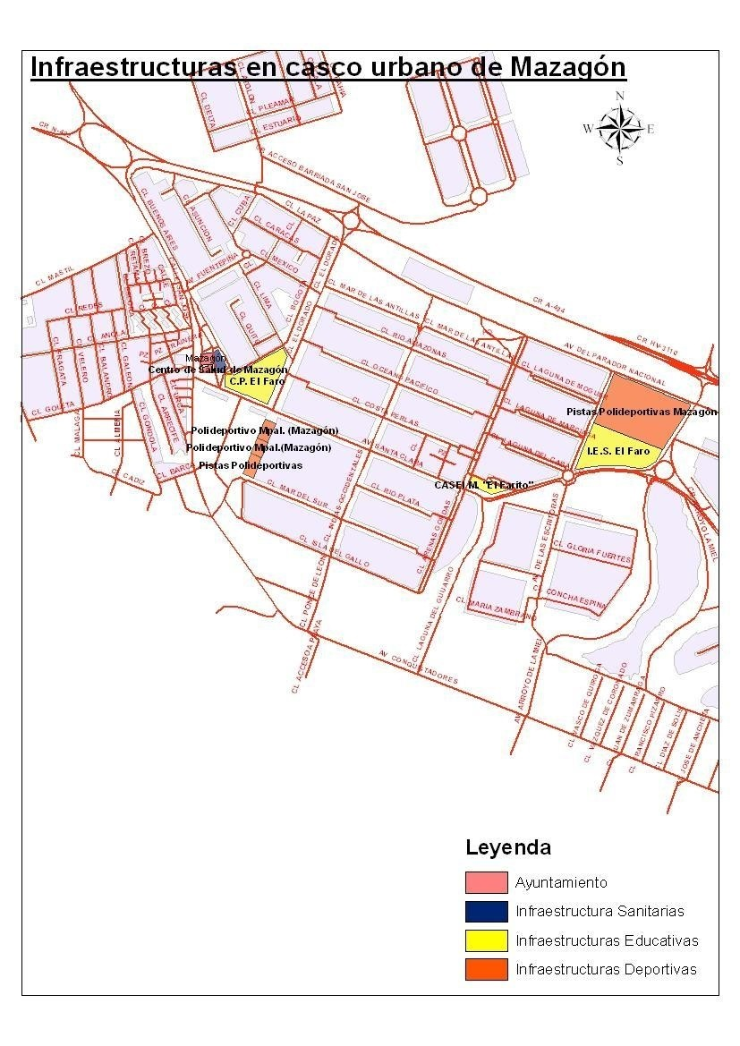 Plano de ubicación infraestructuras, en el actual casco urbano de Mazagón (España).